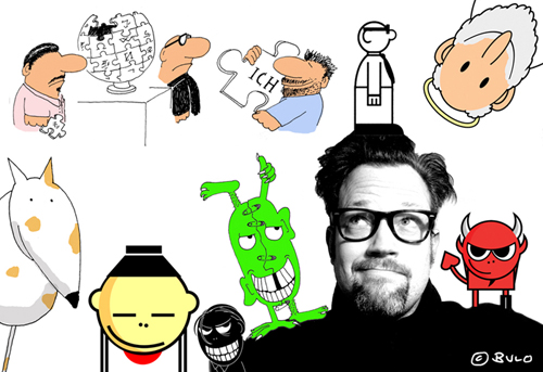 Ein Selbstporträt von Peter "Bulo" Böhling mit einigen seiner Cartoon-Figuren